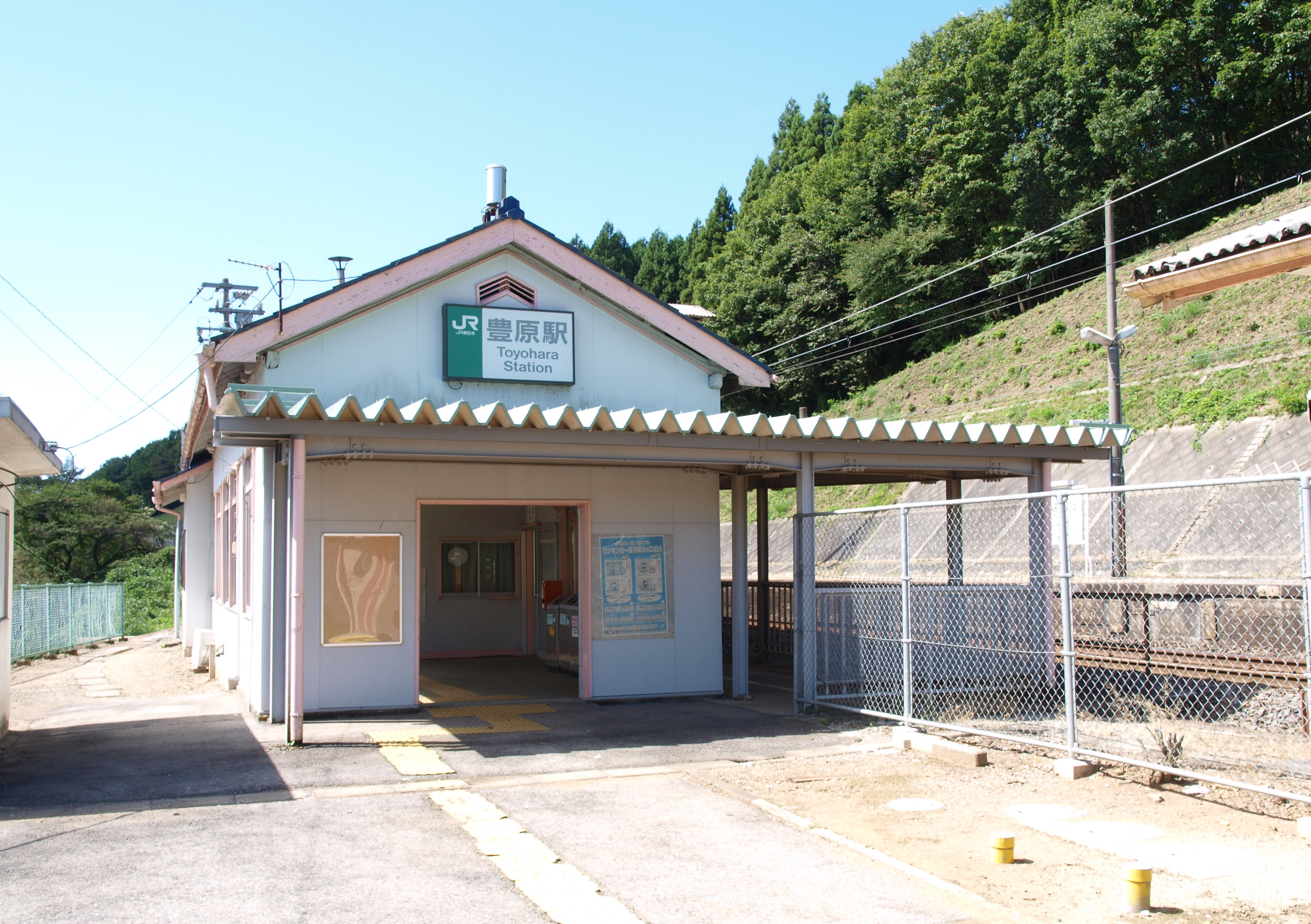 豊原駅駅舎